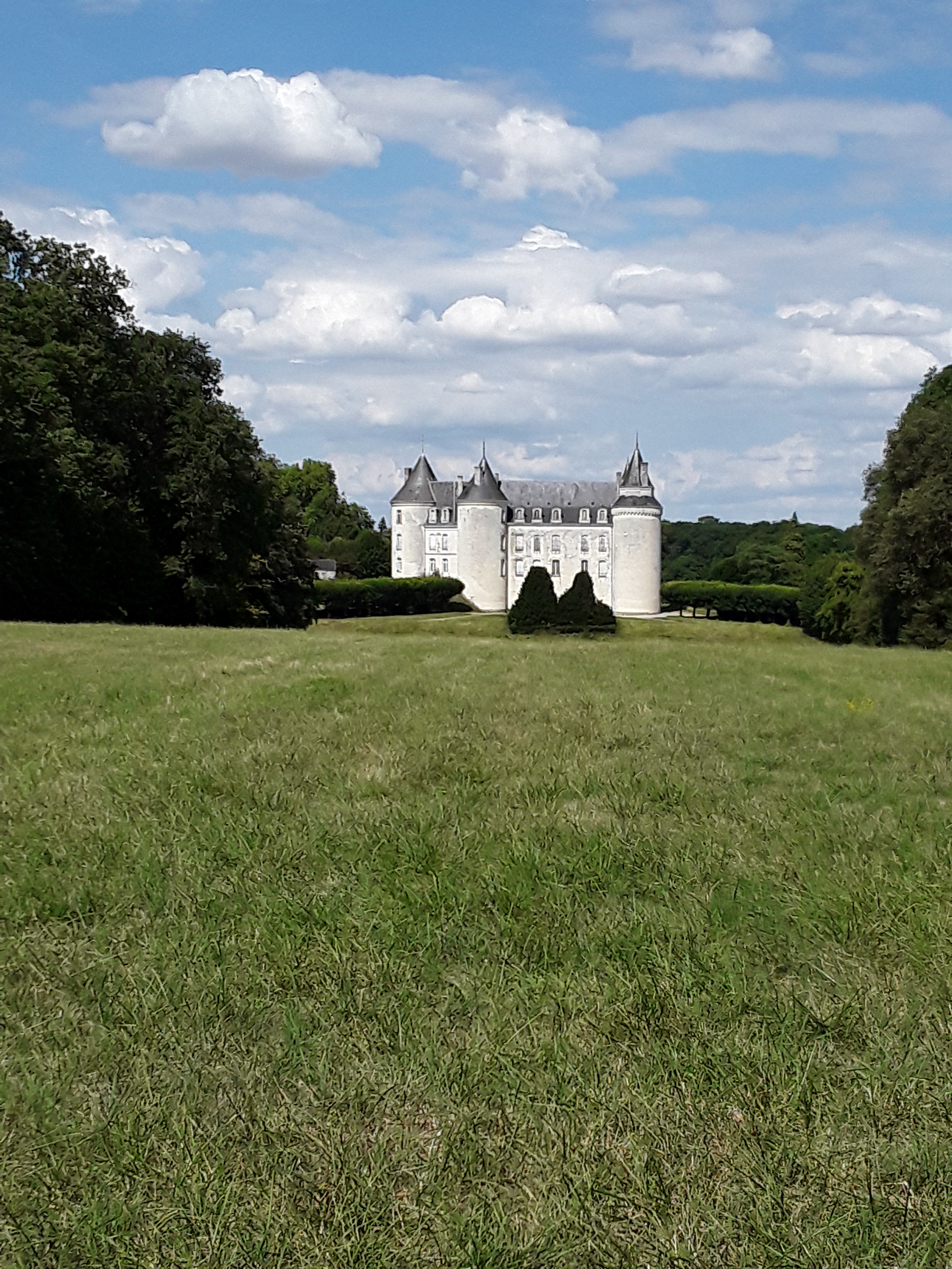 PaYsage du plateau de Bossée au coeur du Plateau Desainte-Maure avec le château de Grillemont